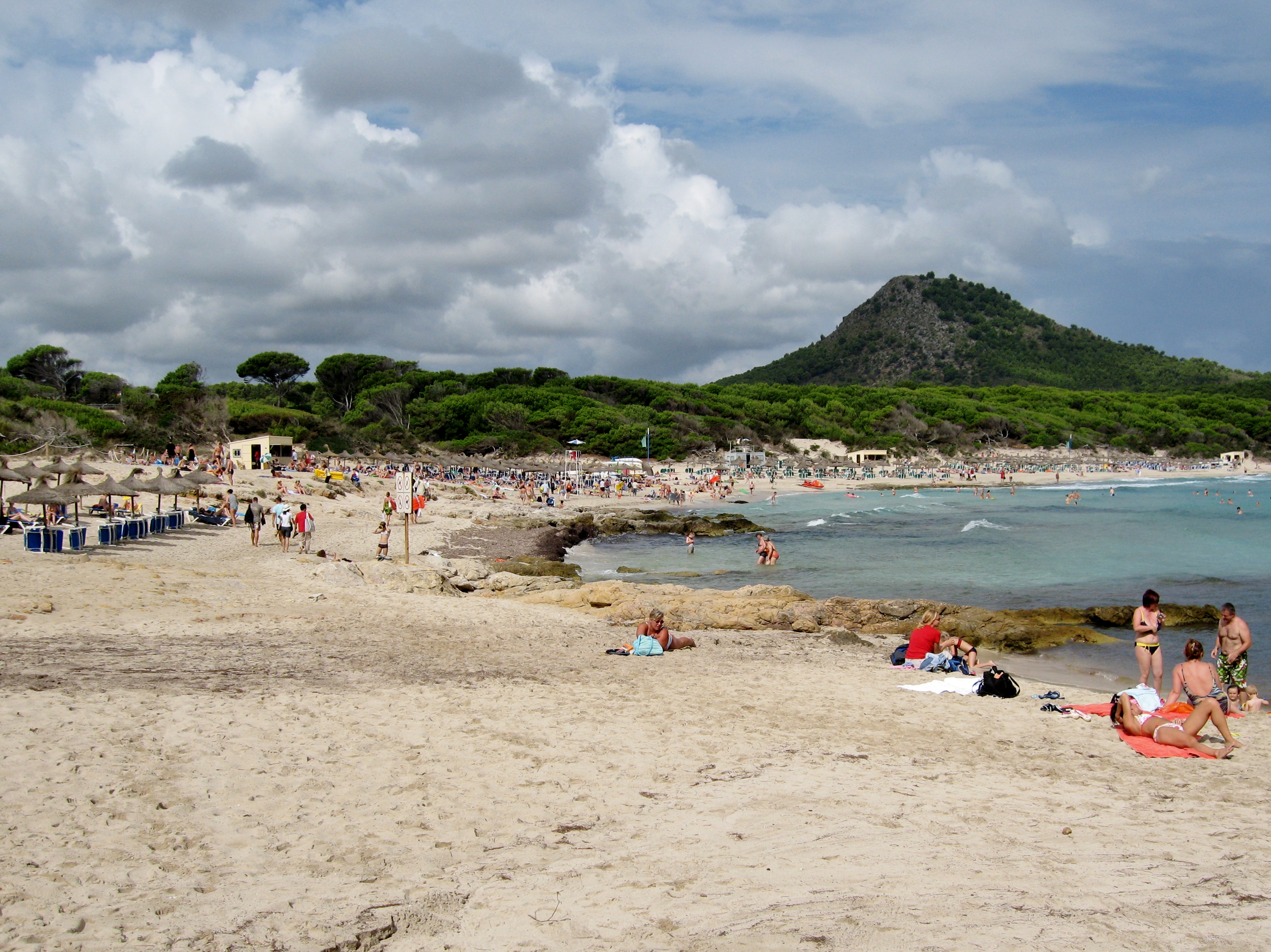 Cala Agulla, Capdepera, Mallorca, Spain